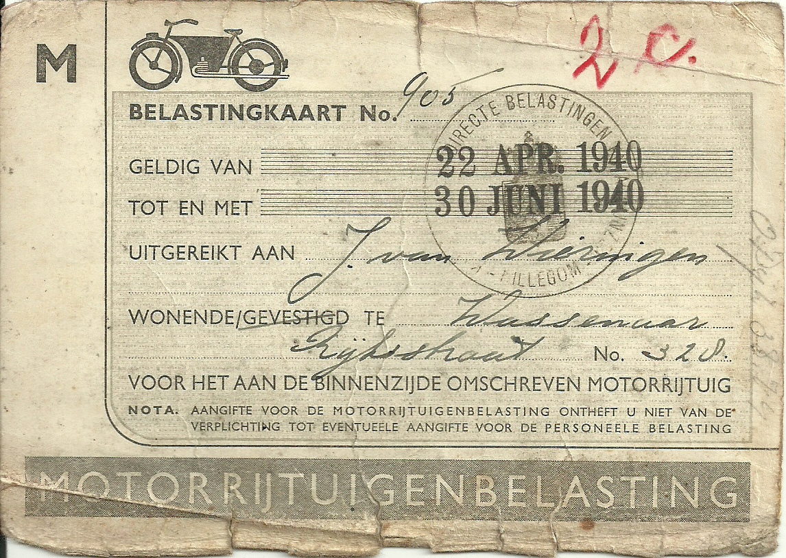 Jan van Wieringen had een DKW sport duo uit 1939. Hij kocht hem op 3 februari 1940 bij rijwielhandel Voortman in Langeraar voor 270,00 gulden. Zijn belastingkaart was geldig van 22 april 1940 tot en met 30 juni 1940 en geadresseerd aan Rijksstraatweg 328, het adres van slagerij Knijnenburg waar hij toen werkte. Lang plezier heeft hij niet van zijn motor gehad, want toen de motorrijtuigen gevorderd werden door de Duitsers heeft mijn vader zijn motor verstopt bij zijn ouders thuis in Hoogmade onder het hooi op de stalzolder. Na de bevrijding haalde hij de motor van zolder, maar toen hij op 8 mei 1945 op weg was van Hoogmade naar zijn huis in Wassenaar, werd zijn motor door de Binnenlandse Strijdkrachten in beslag genomen. Extra pijnlijk was dat hij zijn motor daarna nog vaak zag rijden. Jan van Wieringen deed veel pogingen de motor terug te krijgen, maar zonder succes. Hij kreeg uiteindelijk een vergoeding maar vond dit 'niet veel' en bleef het verlies van zijn motor als een groot onrecht ervaren.